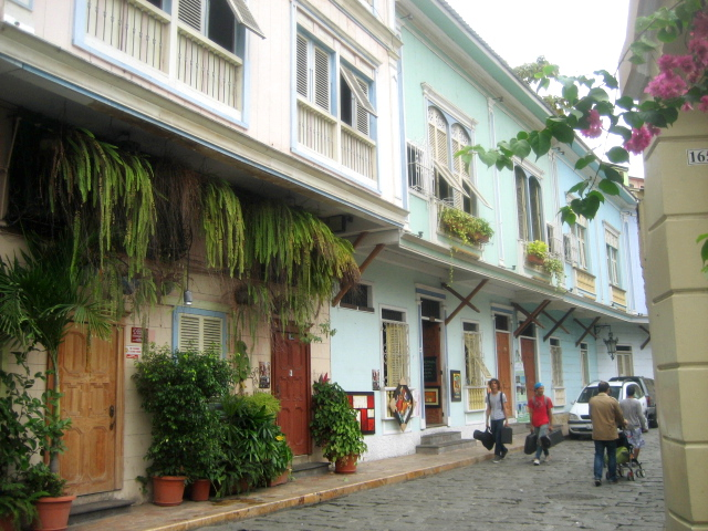 Calle Numa Pompilo Llona en Las Peñas, Guayaquil